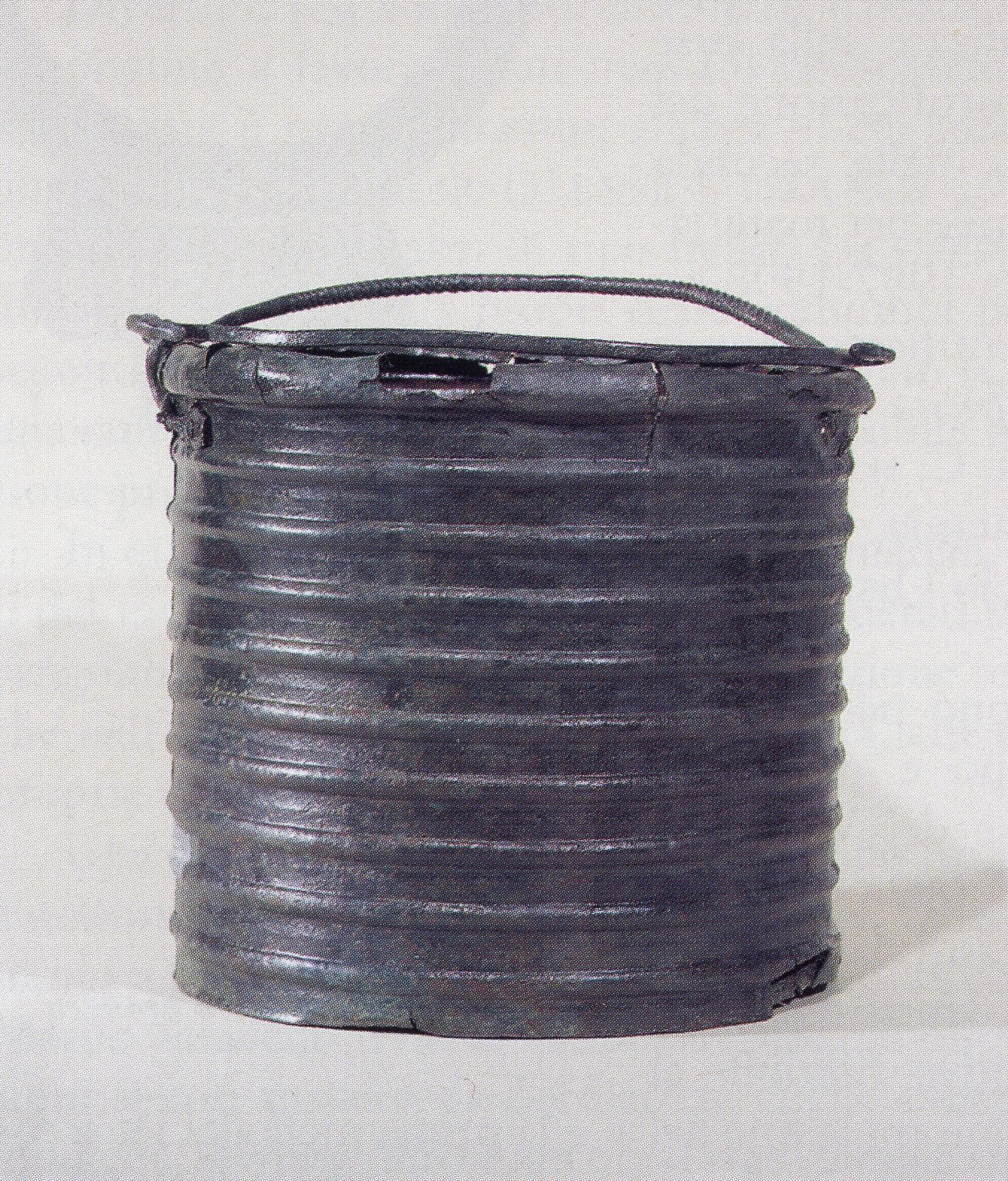 Cista a cordoni. © D’après Lamagna 2005, fig. a p. 104.